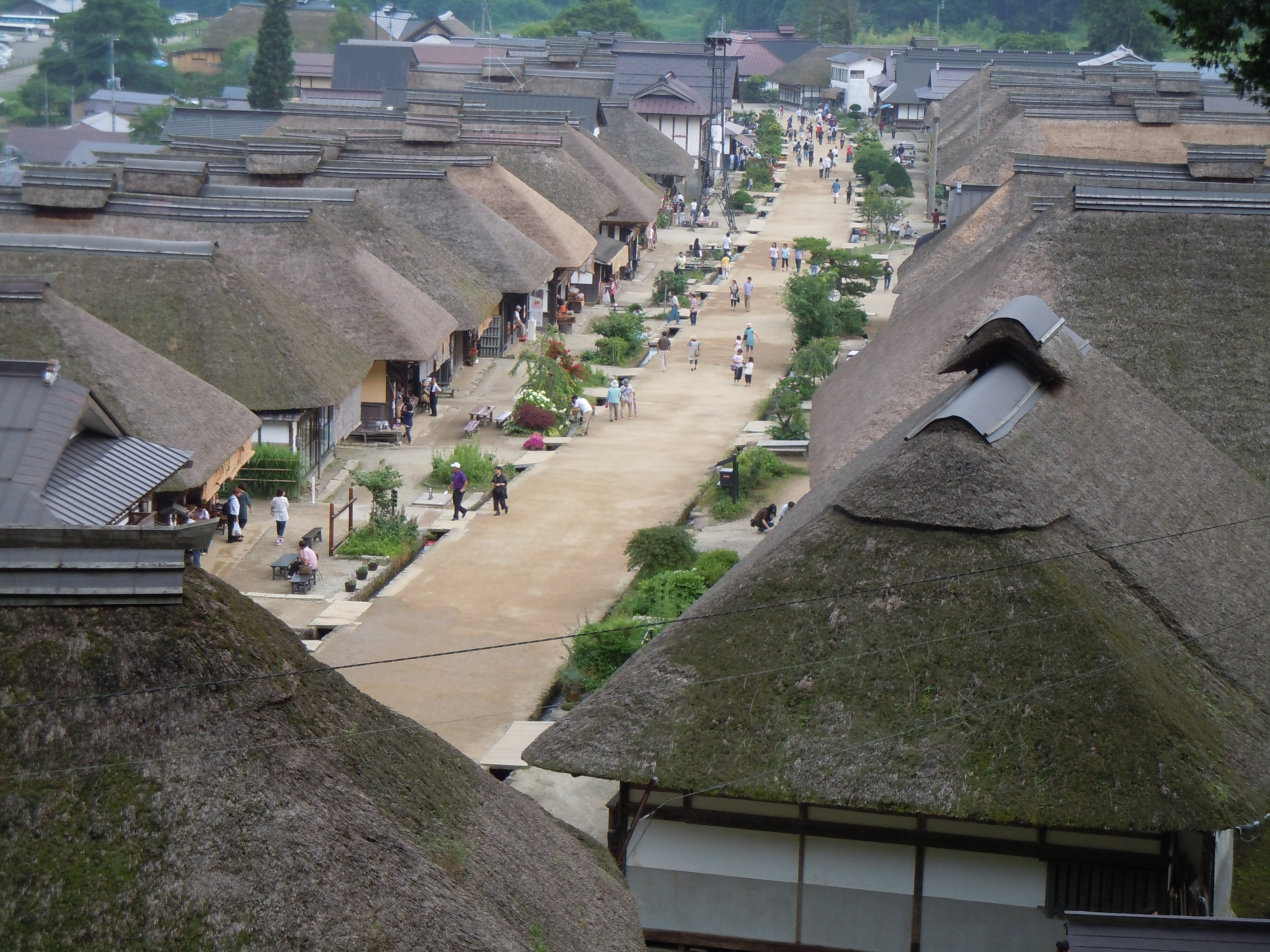 Ouchijuku town like Edo era